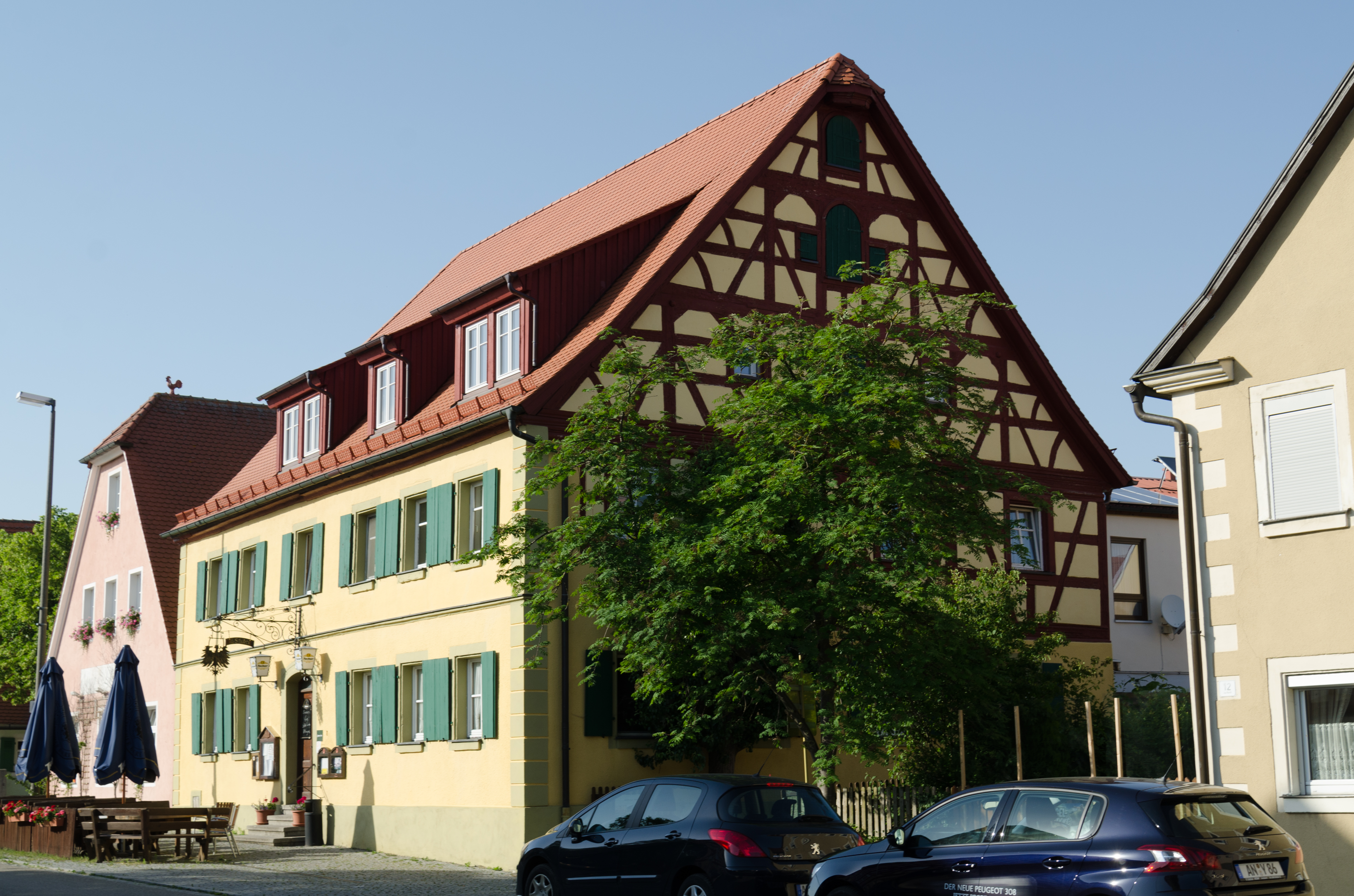 Colmberg, Am Markt 10